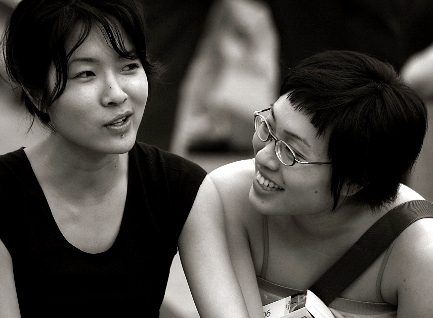 Friends